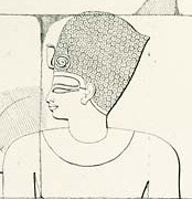 Semna-West, Tempel Thutmosis' III., Äussere Ostwand, Reliefdarstellung des Thutmosis III.